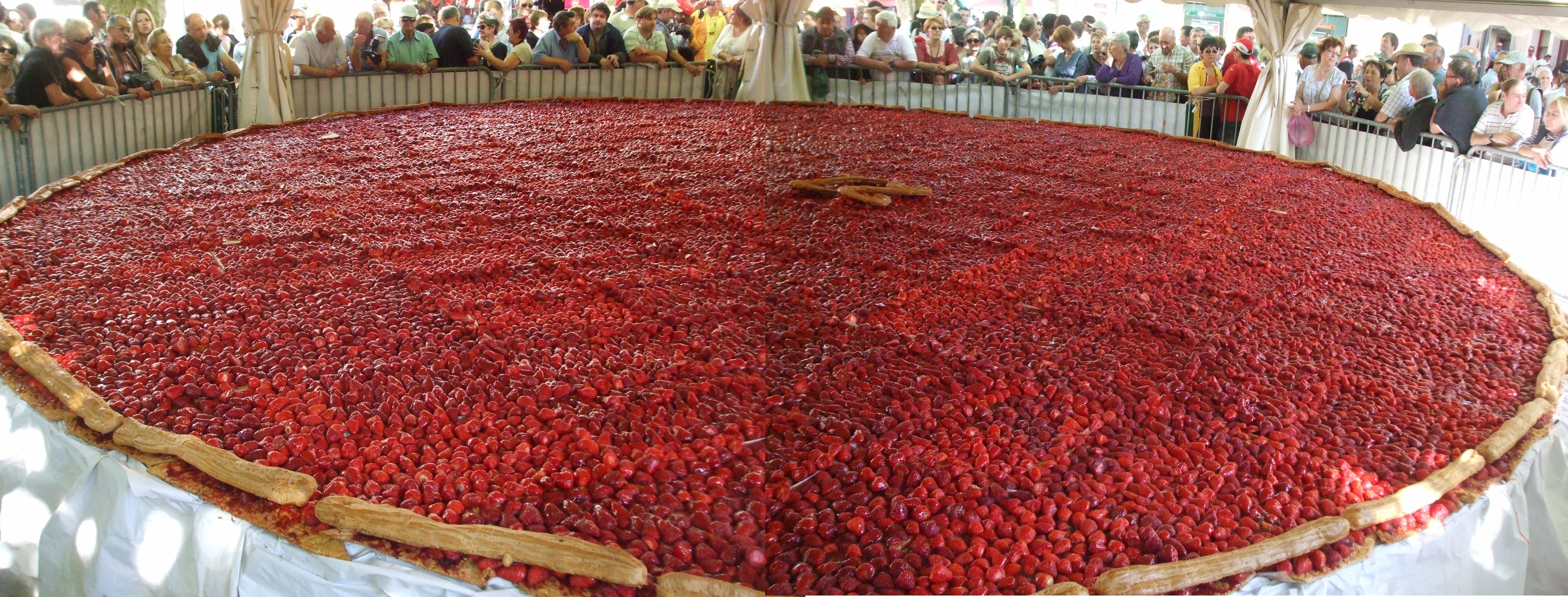 Tarte géante aux cerises